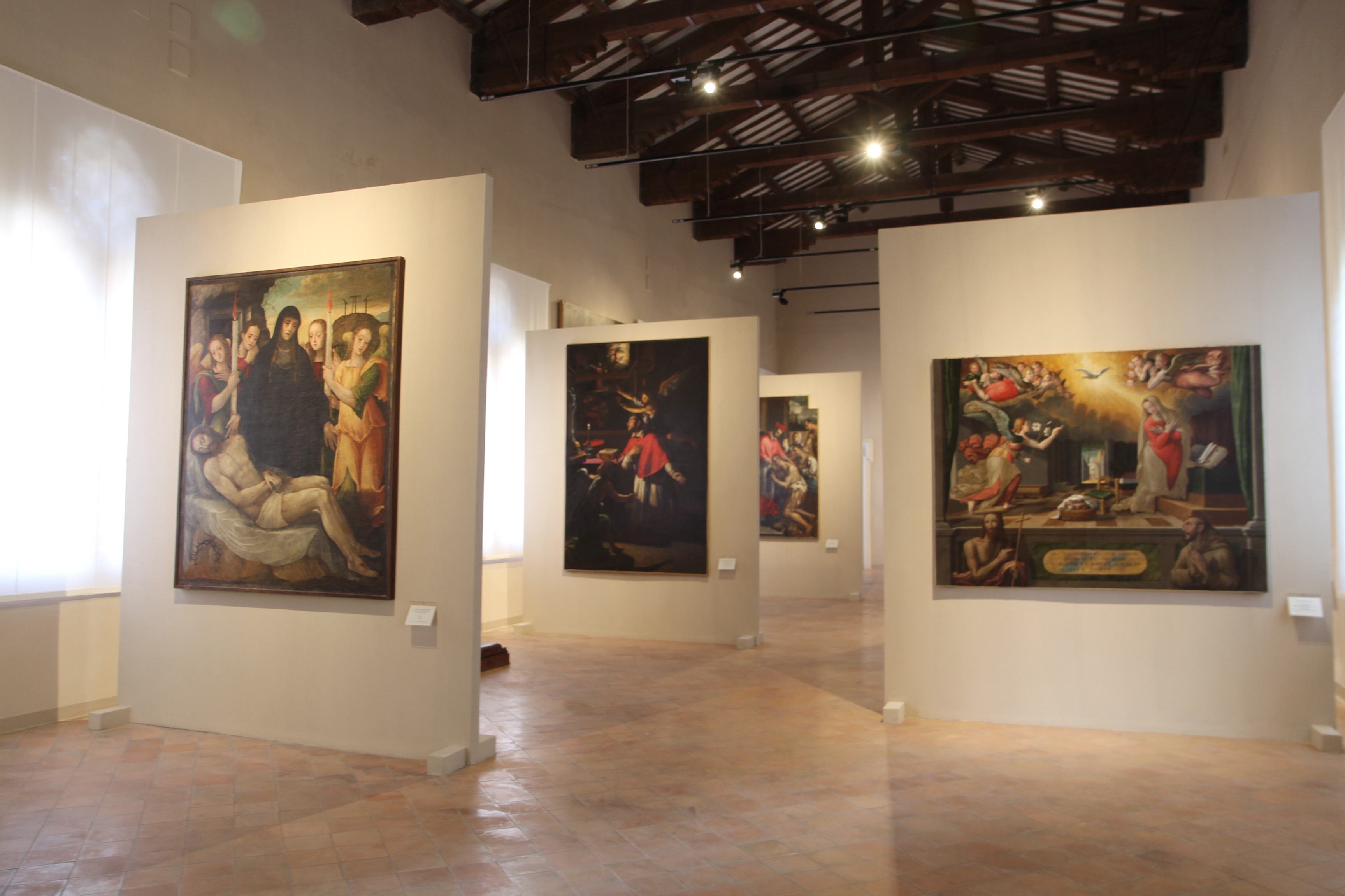 Palazzo Malatesta. Museo Civico Malatestiano - Pinacoteca. This is a photo of a monument which is part of cultural heritage of Italy.